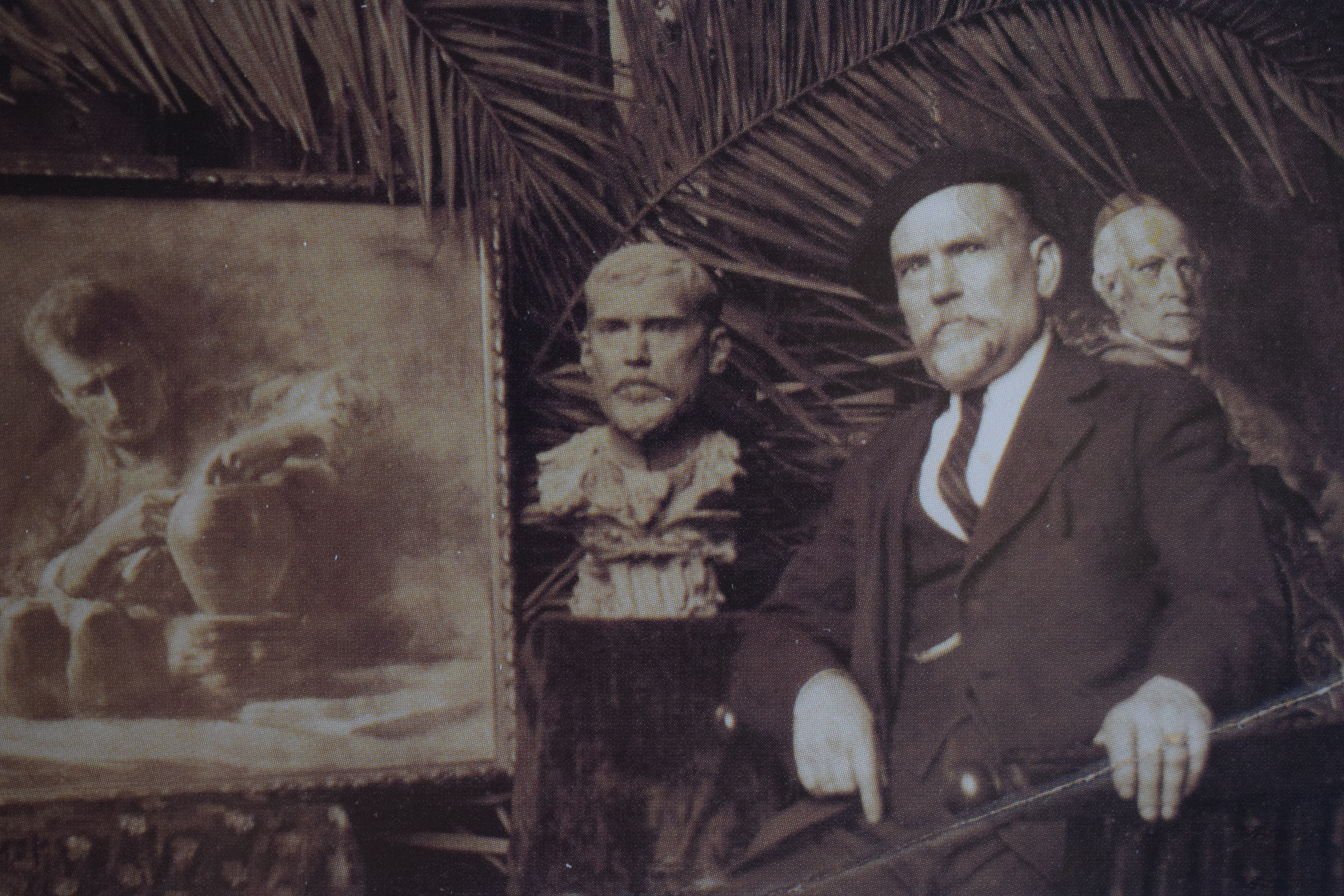 Vicente Poveda y Juan. Roma 1926.